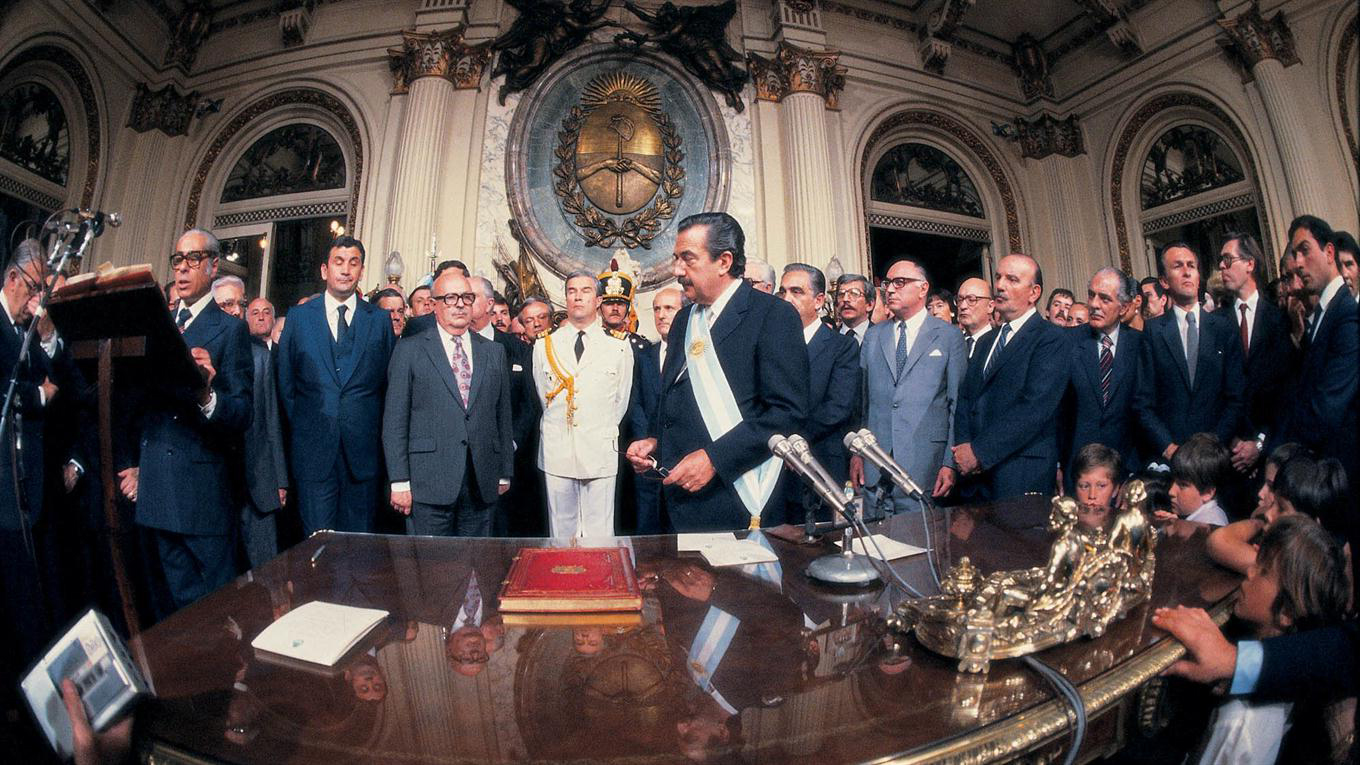 Alfonsín asume tras la dictadura más oscura de la historia argentina